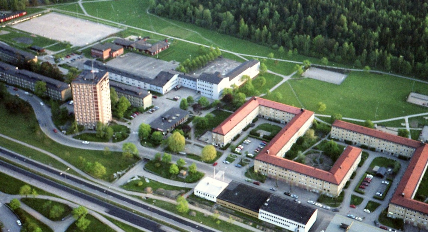 Bergslagsvägen från ballong i höjd med Grimsta (och Grimstaskolan) mot syd i maj 1988